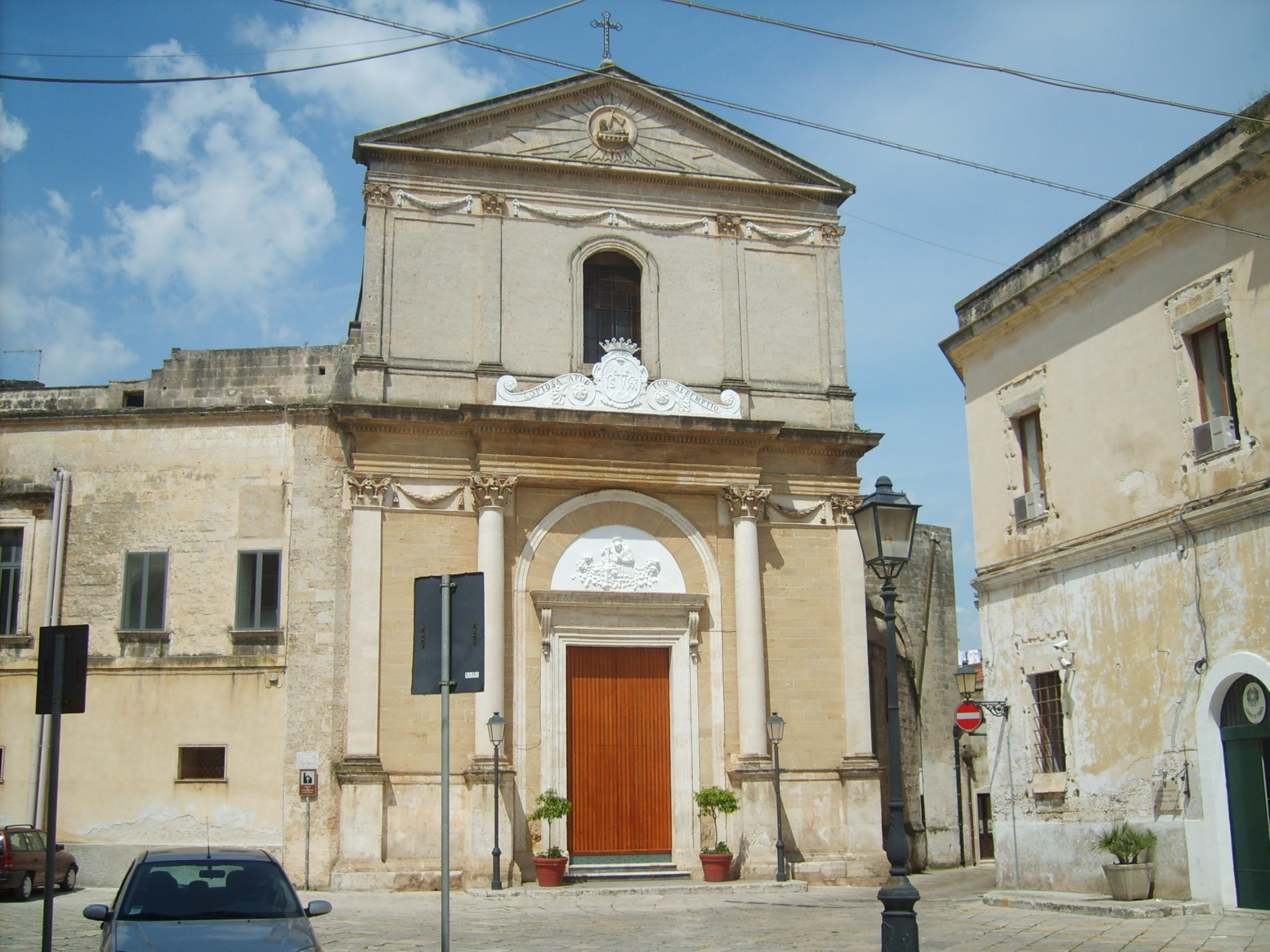 Facciata della Chiesa dei Padri Liguorini